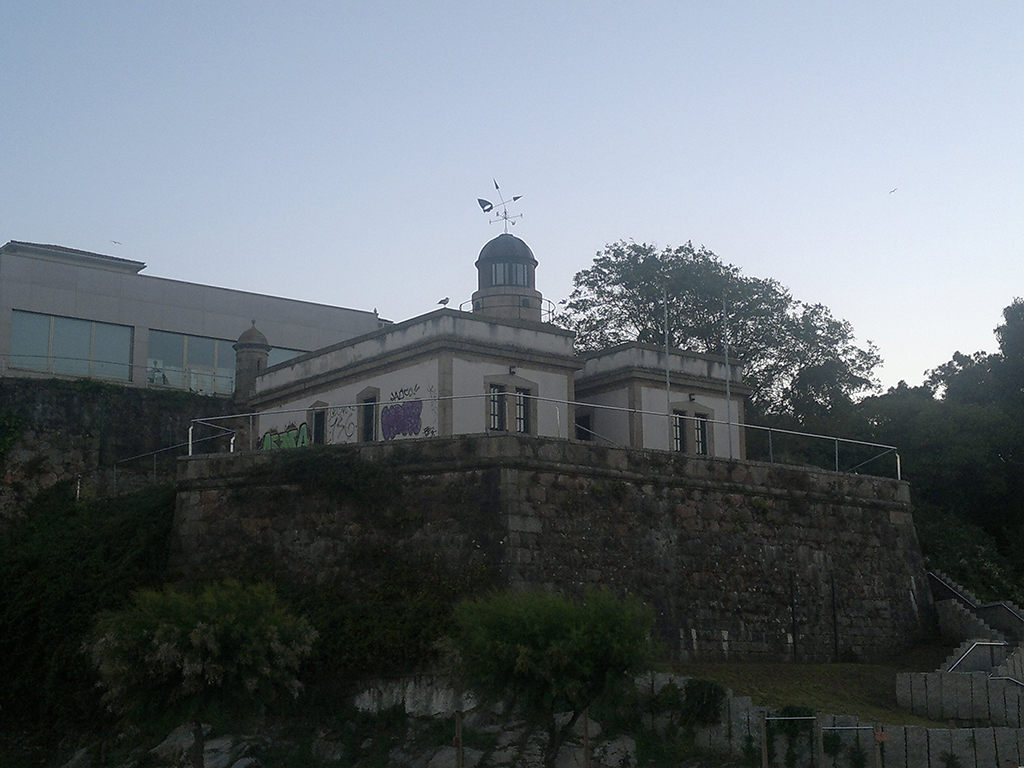 Faro de Oza, na Coruña.